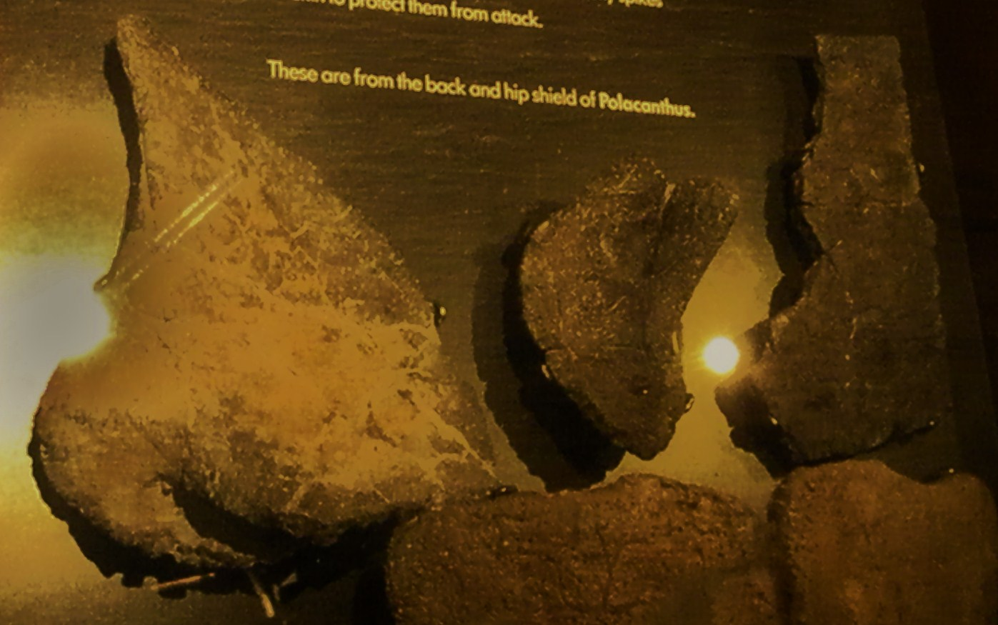 Fossil of Polacanthus, an extinct dinosaur-- Took the photo at Natural History Museum, London